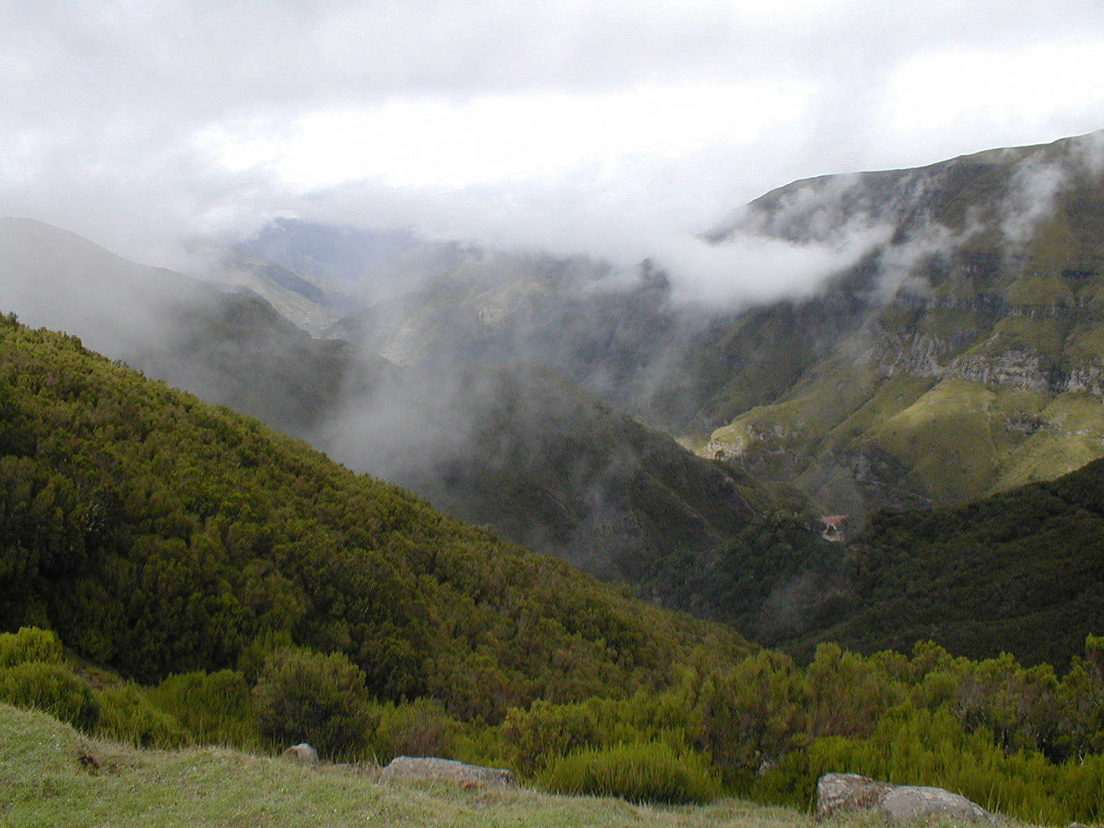 Hinterland mit den typischen Wolken in Madeira